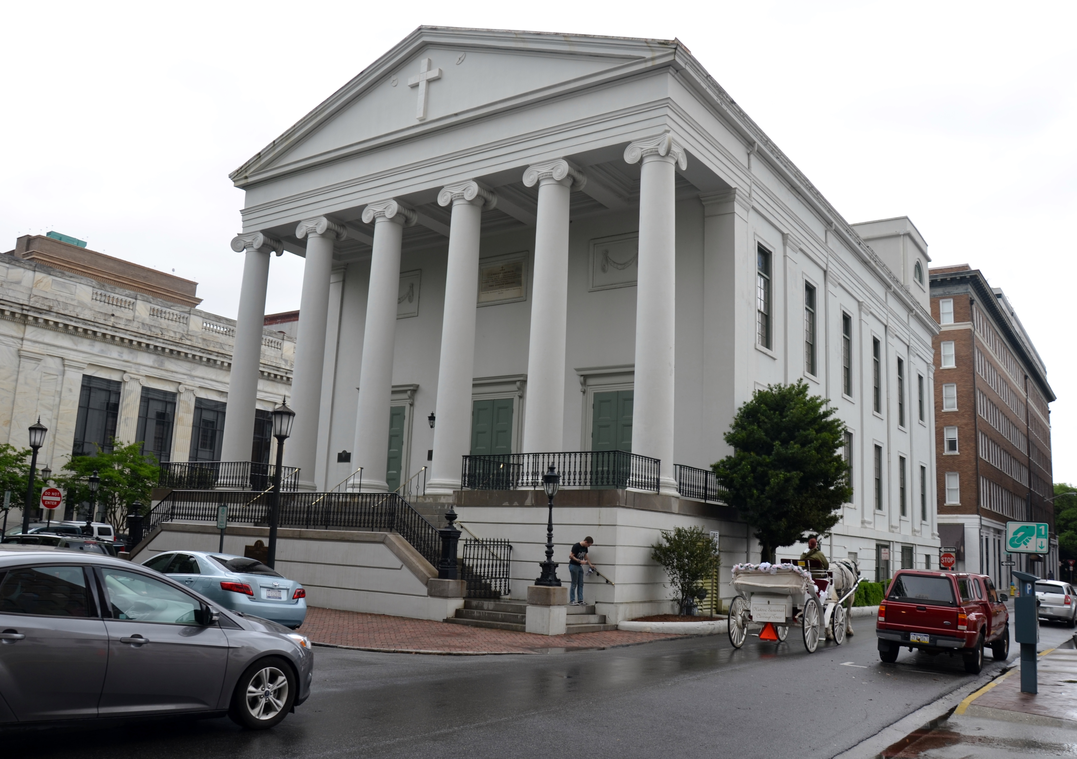 Eastside, Savannah, GA 31401, USA